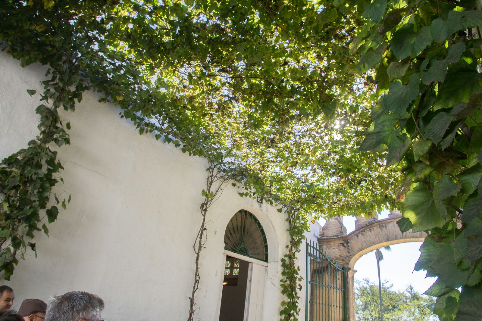 Es una vista interior del arco histórico de entrada a la Bodega así como del emparrado que la preside.